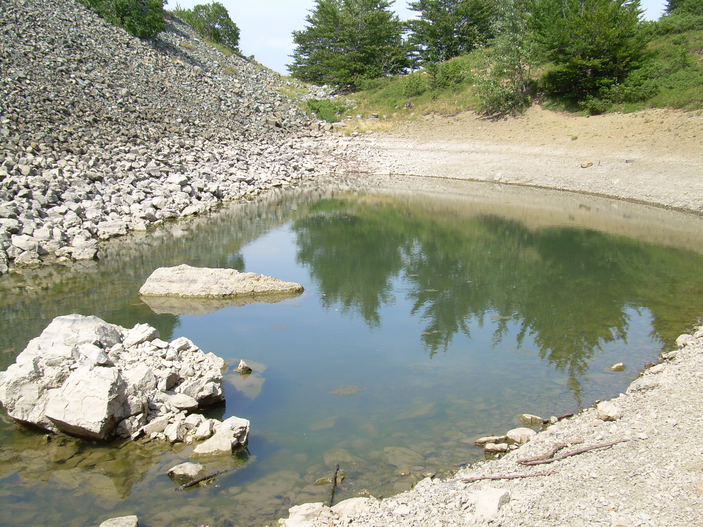 Il "fratellino" del Lago Bino Maggiore si è staccato da esso dopo una frana. Si trova ai piedi di un grande ghiaione che lo sta pian piano inghiottendo.